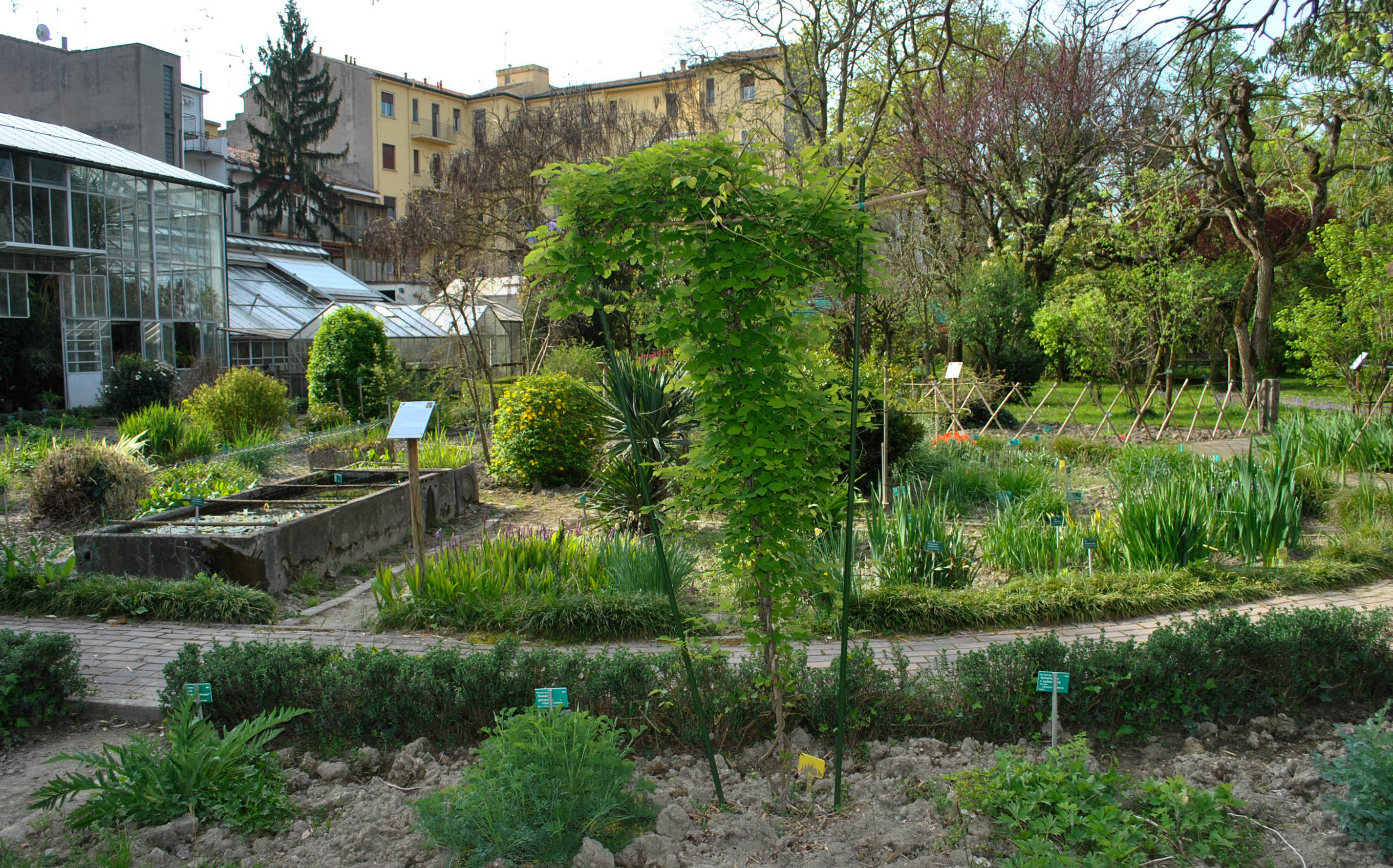 Interno dell'orto Botanico dell'Università di Ferrara situato nel giardino di Palazzo Turchi di Bagno.